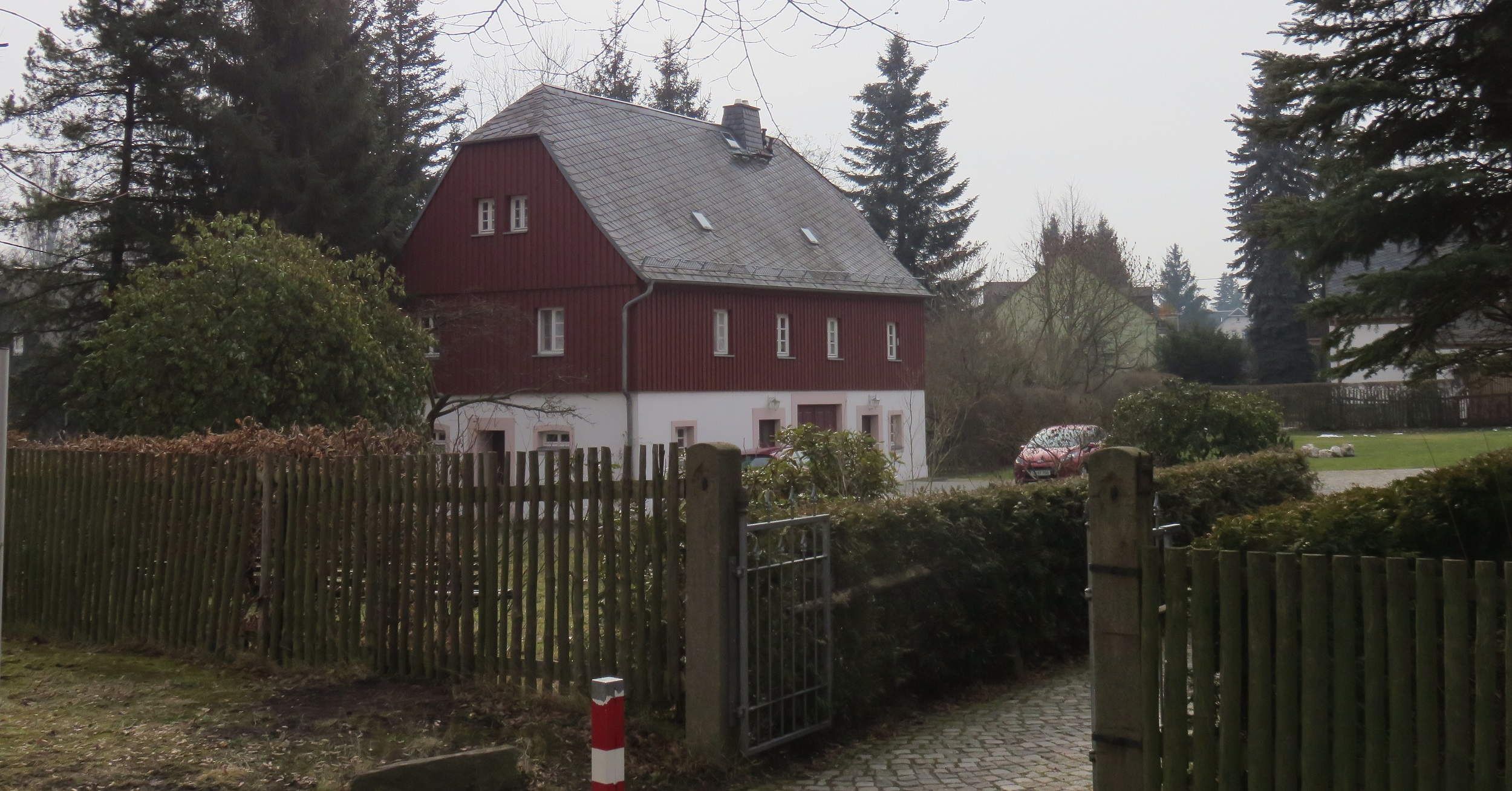 Nebengebäude zu Pfarrhaus, Zwickauer Straße 516. Kulturdenkmal Chemnitz-Reichenbrand.